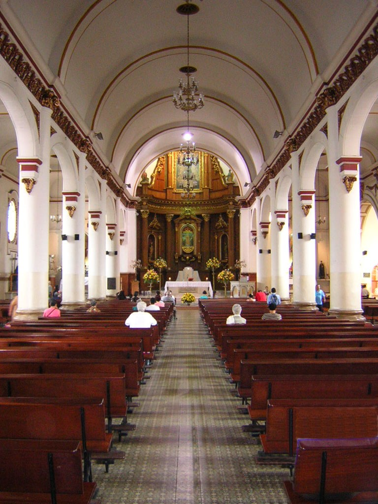 Iglesia San José, Nave Central, Medellín, Colombia